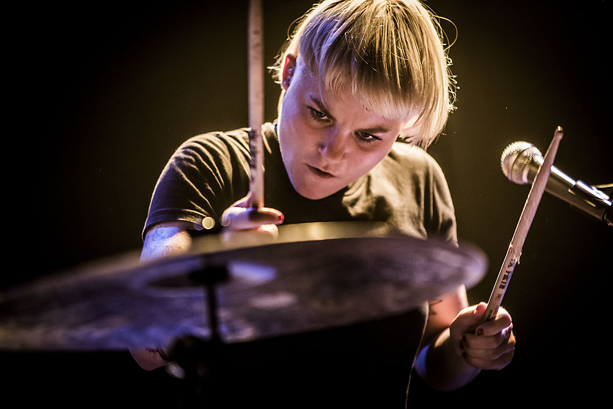 Trommeslager Maria Juntunen fra Nelson Can